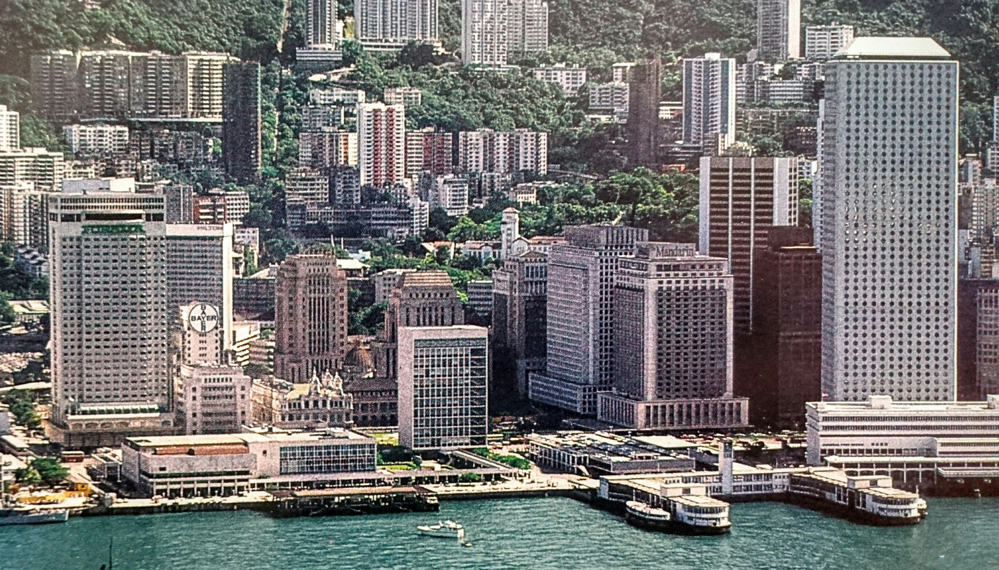 Central, Hong Kong